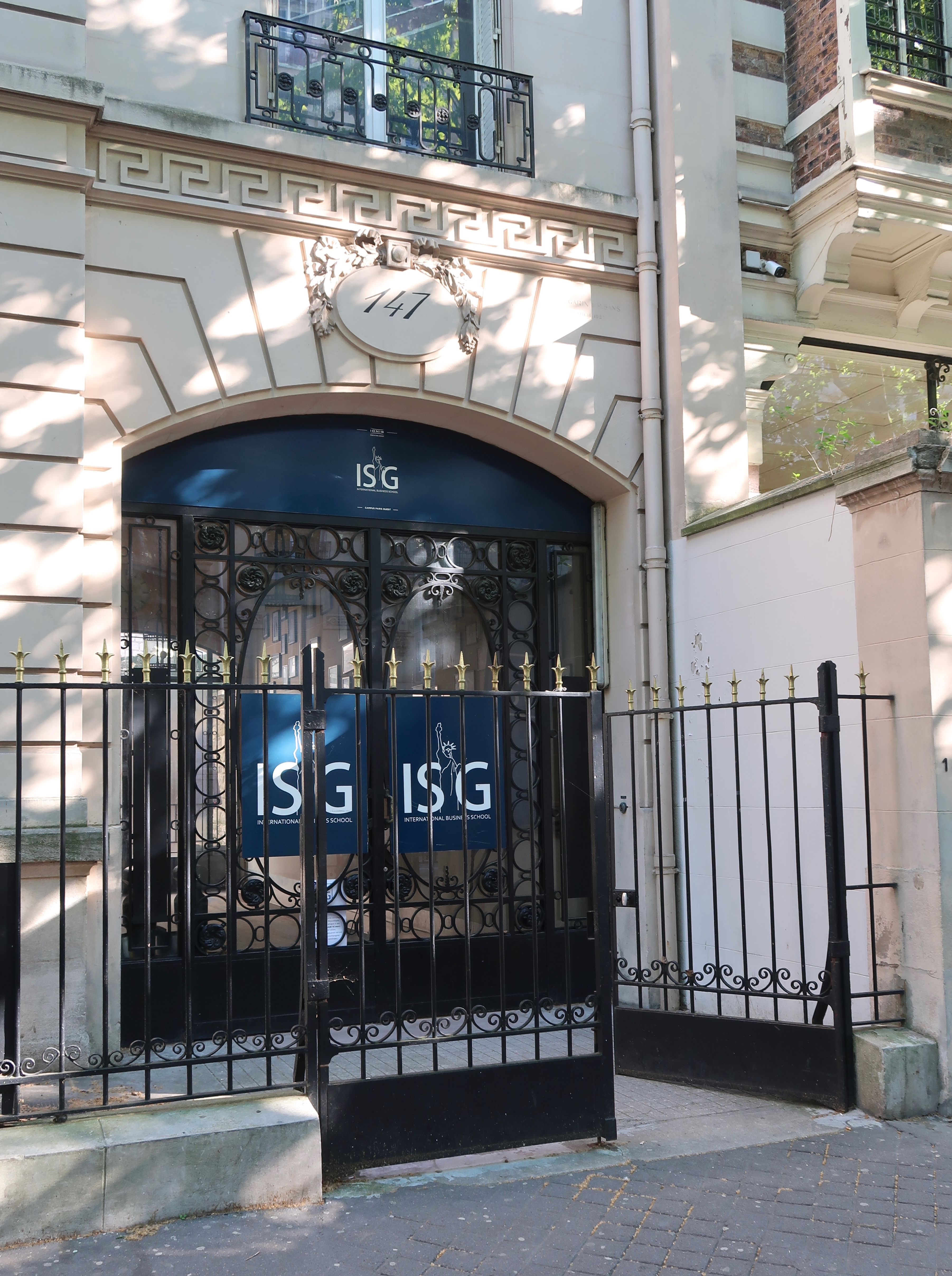 Bâtiment de l'ISG (Institut supérieur de gestion), 147 avenue Victor-Hugo (Paris, 16e).